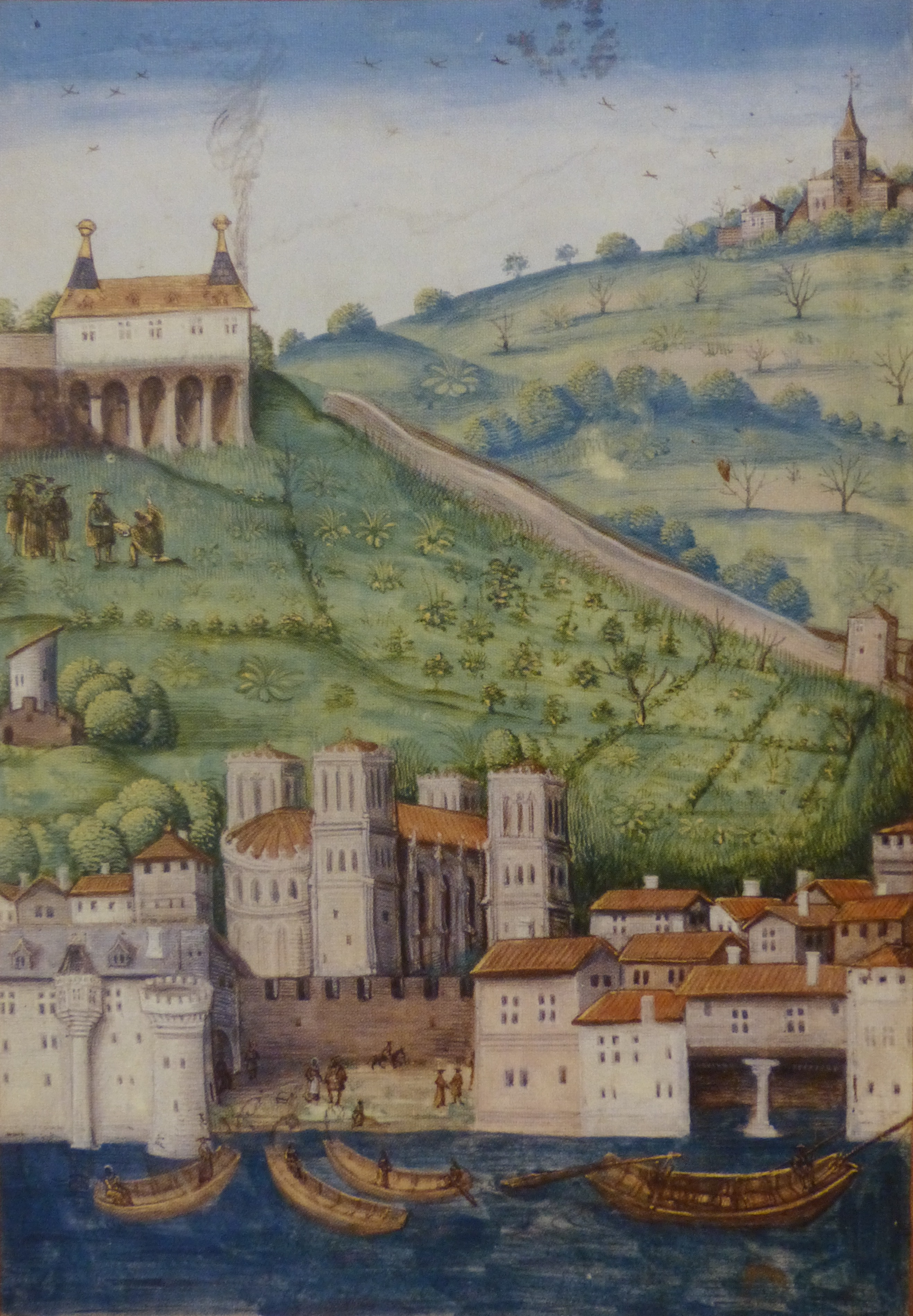 Vue de Lyon en 1523, par Pierre Sala. - La scène avec des personnages évoque la visite que fit François 1er à Pierre Sala.